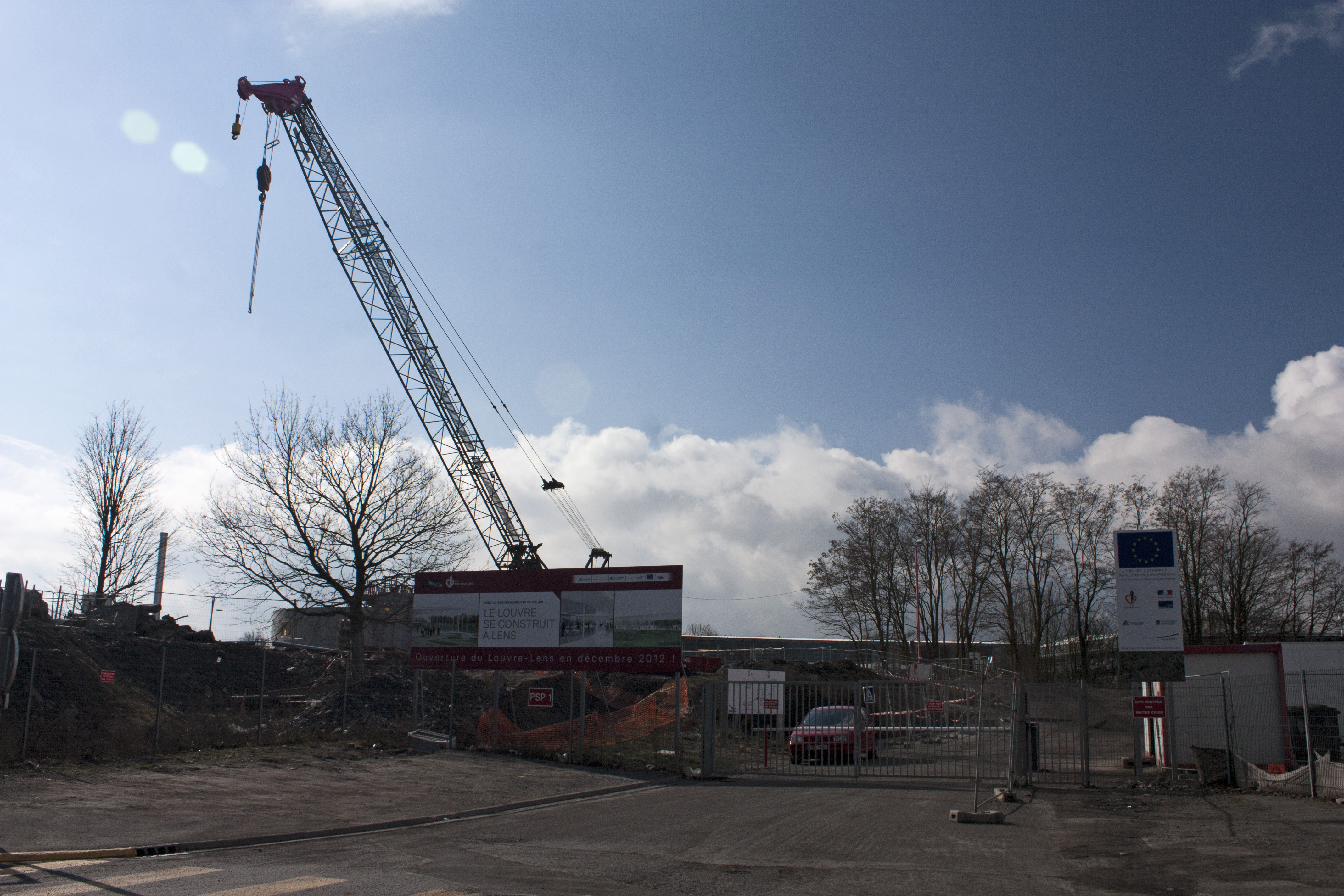 Le Chantier du Louvre Lens dont on devine les bâtiments en arrière-plan.